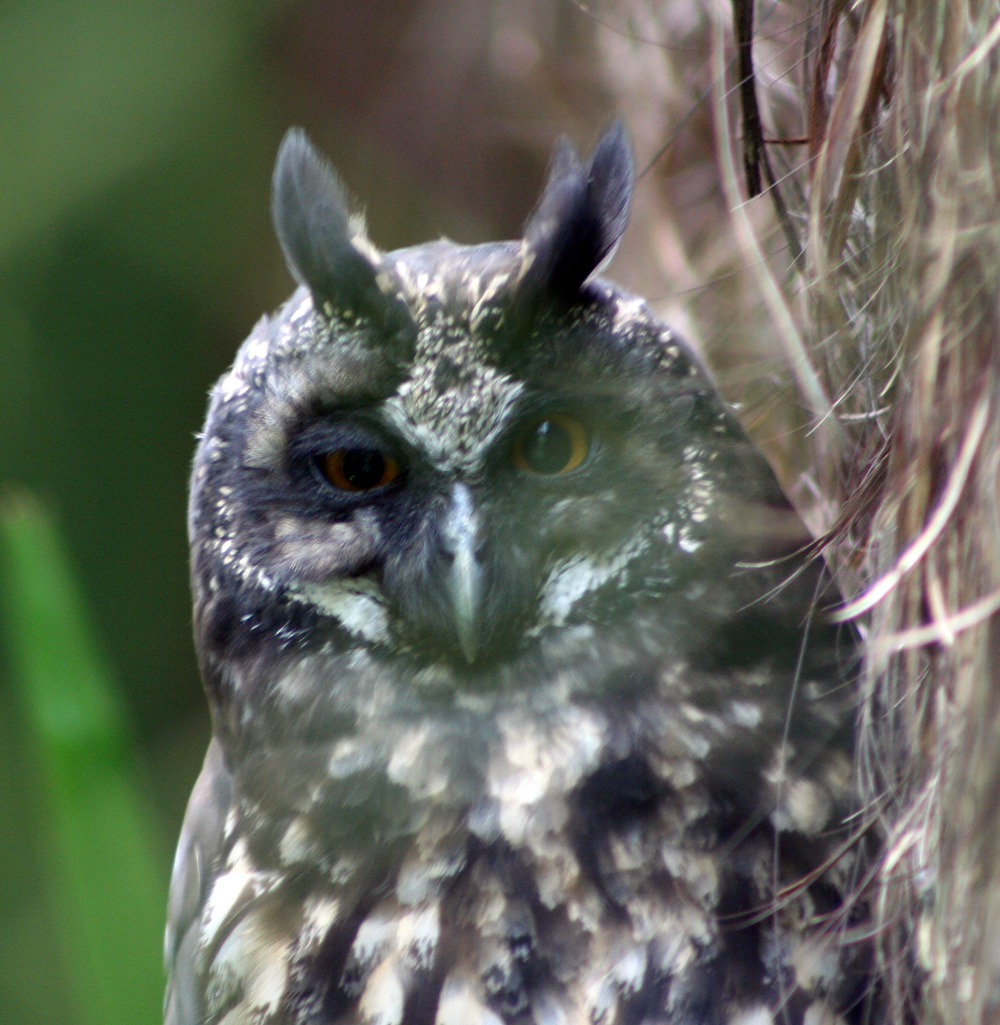 Mocho Diabo Asio stygius